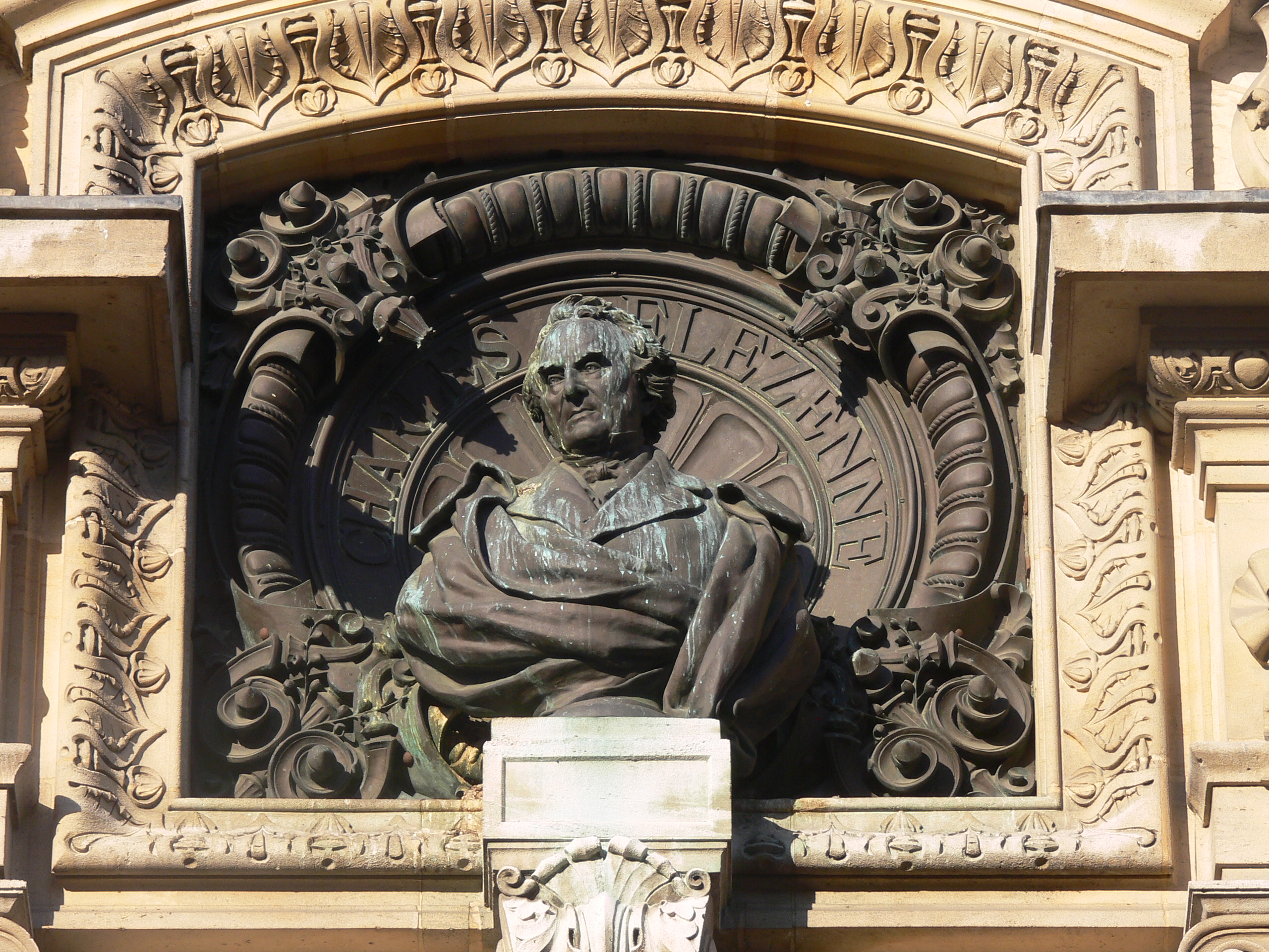 Pour honorer Charles Delezenne et en sa mémoire, François Damien a fait poser un portrait en buste - en bronze - au dessus de l'entrée de l'Institut de Physique de Lille (devenu l'ESJ, École supérieure de journalisme de Lille) ; rue Gauthier-de-Châtillon. Charles Delezenne est né au dernier quart du XVIII° siècle (1776), peu avant à Révolution française. Mathématicien, physicien, chimiste, inventeur et surtout enseignant, il fut un membre éminent de la Société des Sciences, de l'Agriculture et des Arts de Lille (à partir de 1806). Cette société savante a conservé trace de ses travaux sur la l'optique, l'acoustique, l'électricité, l'électromagnétisme, mais aussi sur la météorologie et l'aréométrie. On se souvient de lui dans le nord de la France, et tout particulièrement à Lille comme ayant été le premier promoteur de l'enseignement de la Physique